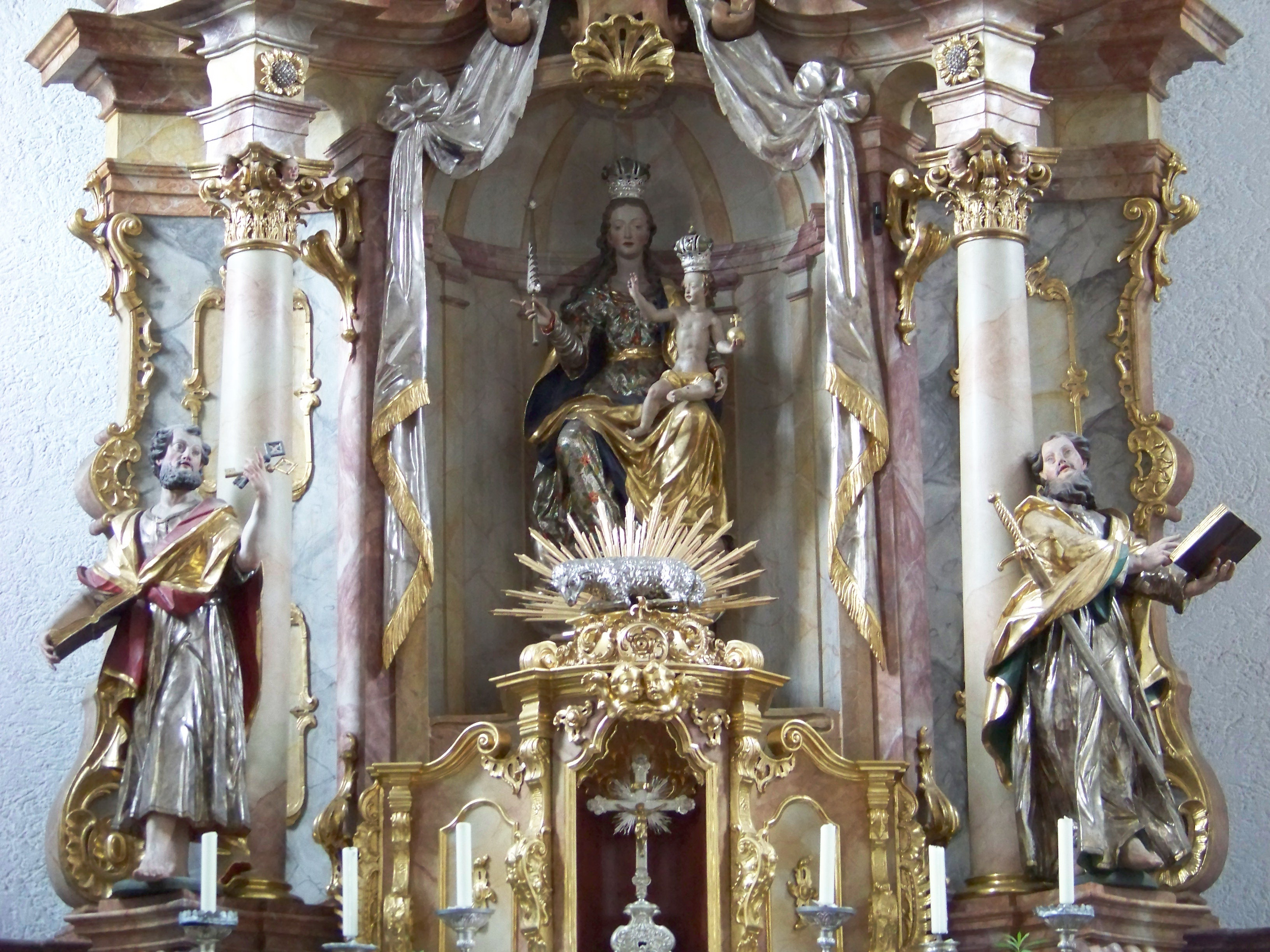 Neufahrn in Niederbayern, Hauptstraße 22. Pfarrkirche Mariä Himmelfahrt. Neubau in basilikaler Form 1937/38, vom Vorgängerbau (Chor romanisch, Langhaus 1620) Die Ausstattung der älteren Kirche wurde übernommen. In der Mittelnische des Hochaltars Maria als Patrona Bavaria mit dem Jesuskind. Seitenfiguren St. Petrus und St. Paulus.